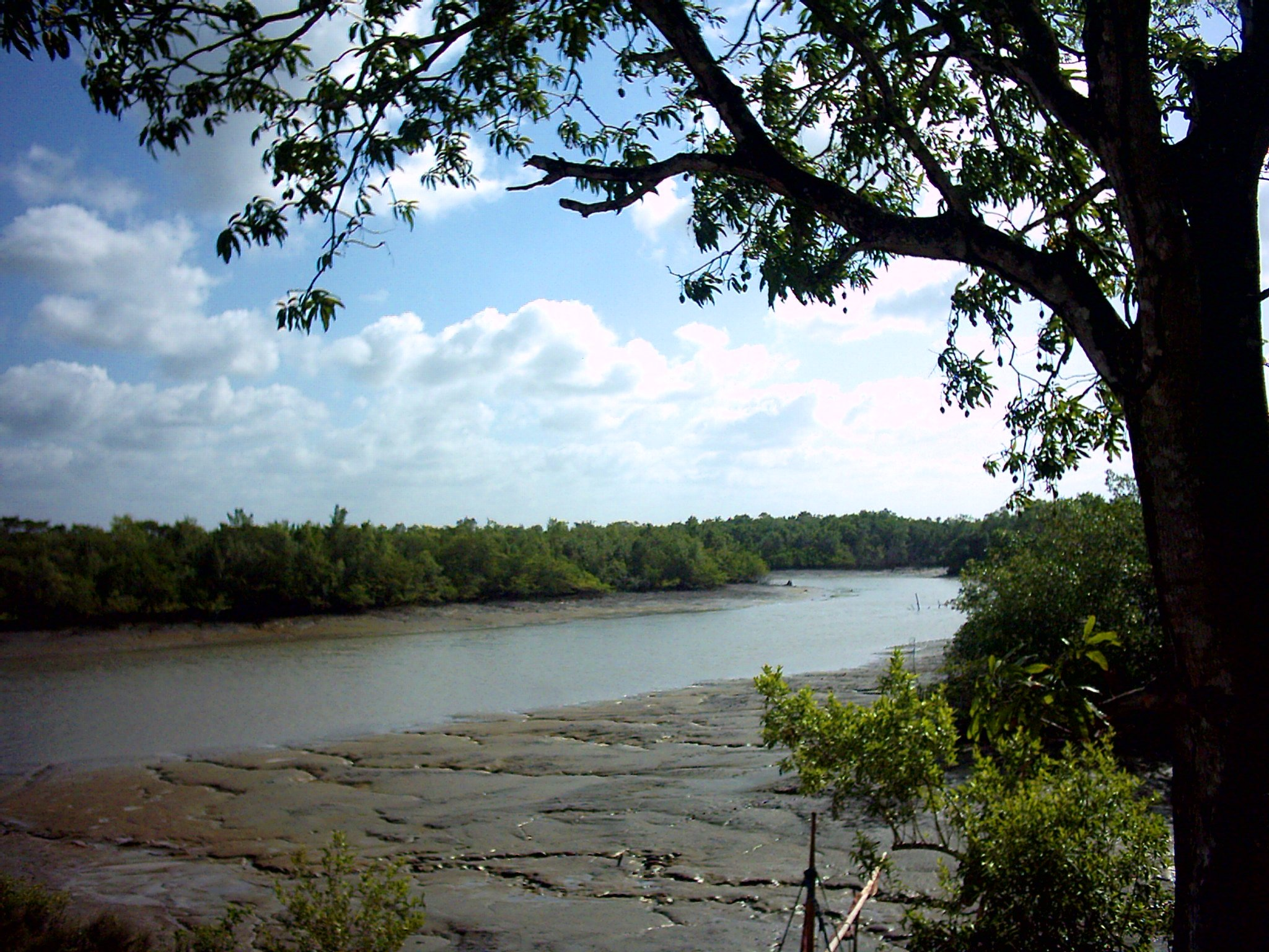 Uma das visões do Rio Sipotiúa na Area de Proteção Ambiental das Reentrâncias Maranhenses